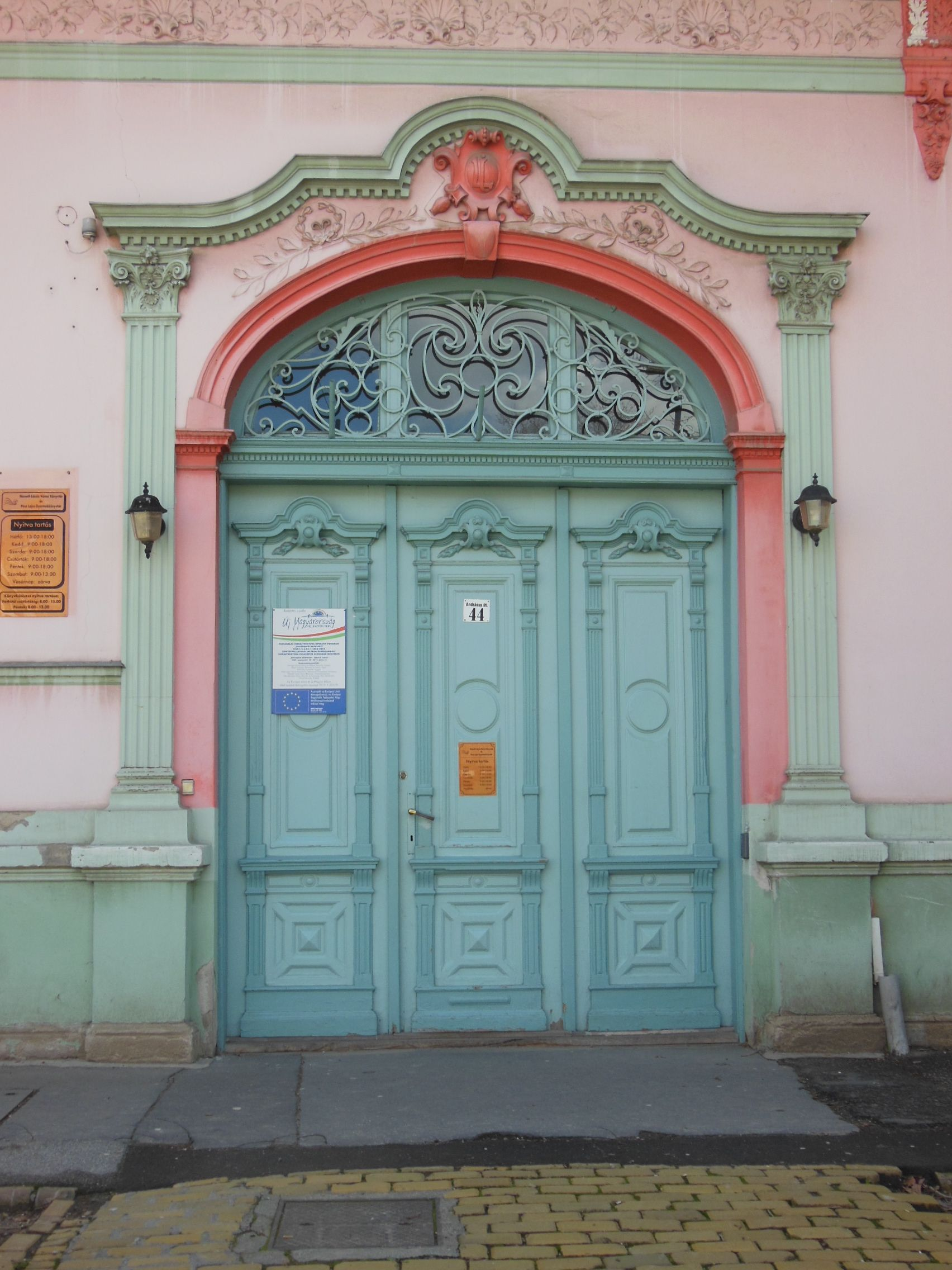 Németh László Városi Könyvtár főbejárata (Hódmezővásárhely, Andrássy u. 44.)